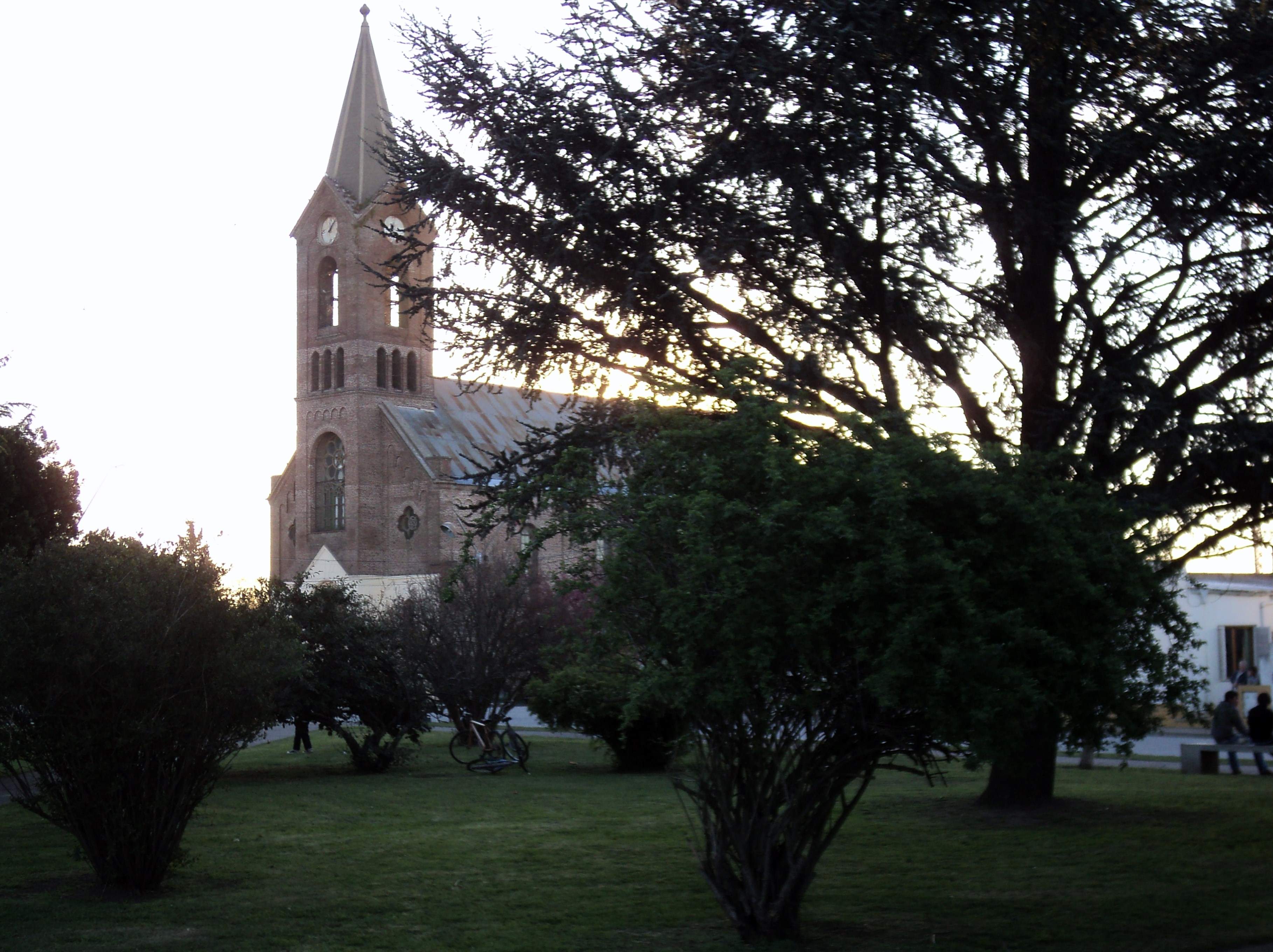 iglesia catolica de la localidad